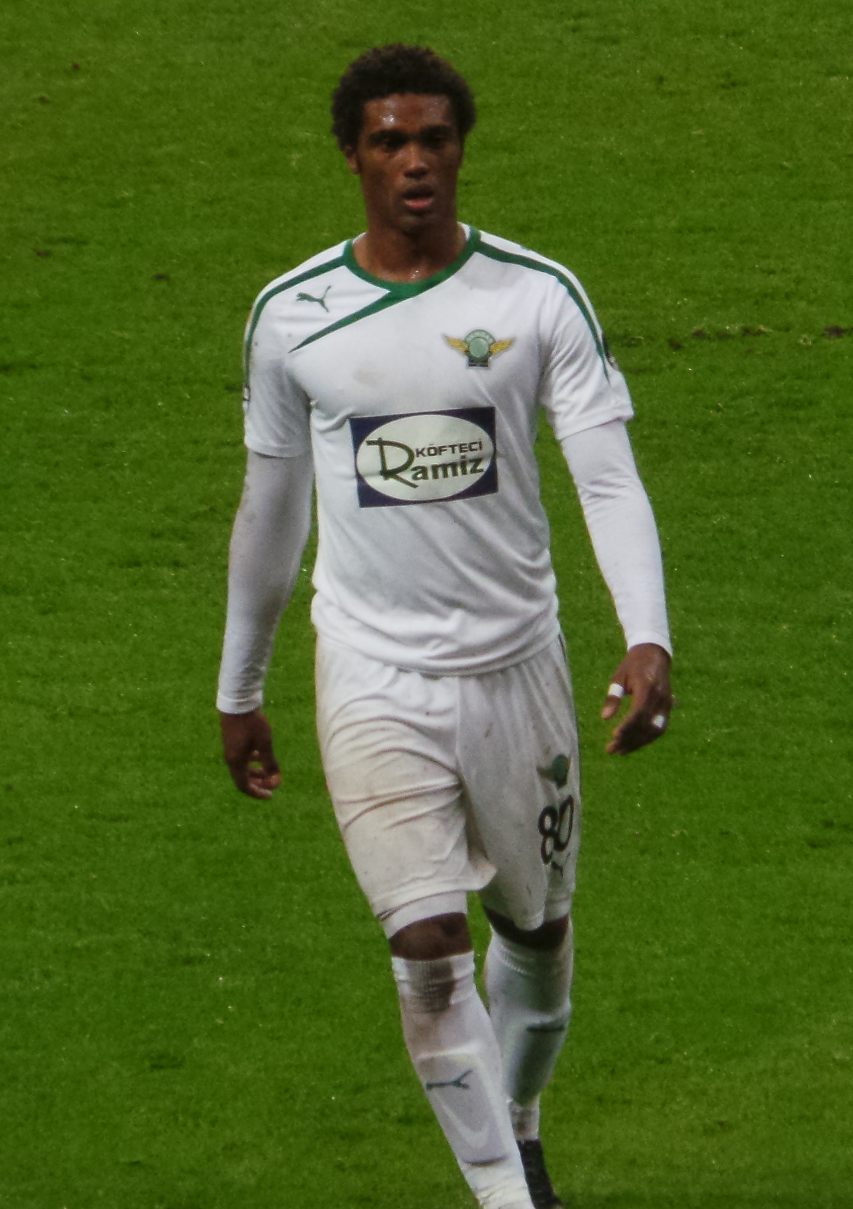 Bruno Mezenga